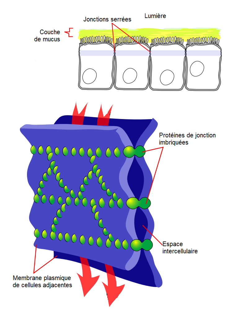 Représentation de cellules épithéliales reliées par des jonctions serrées